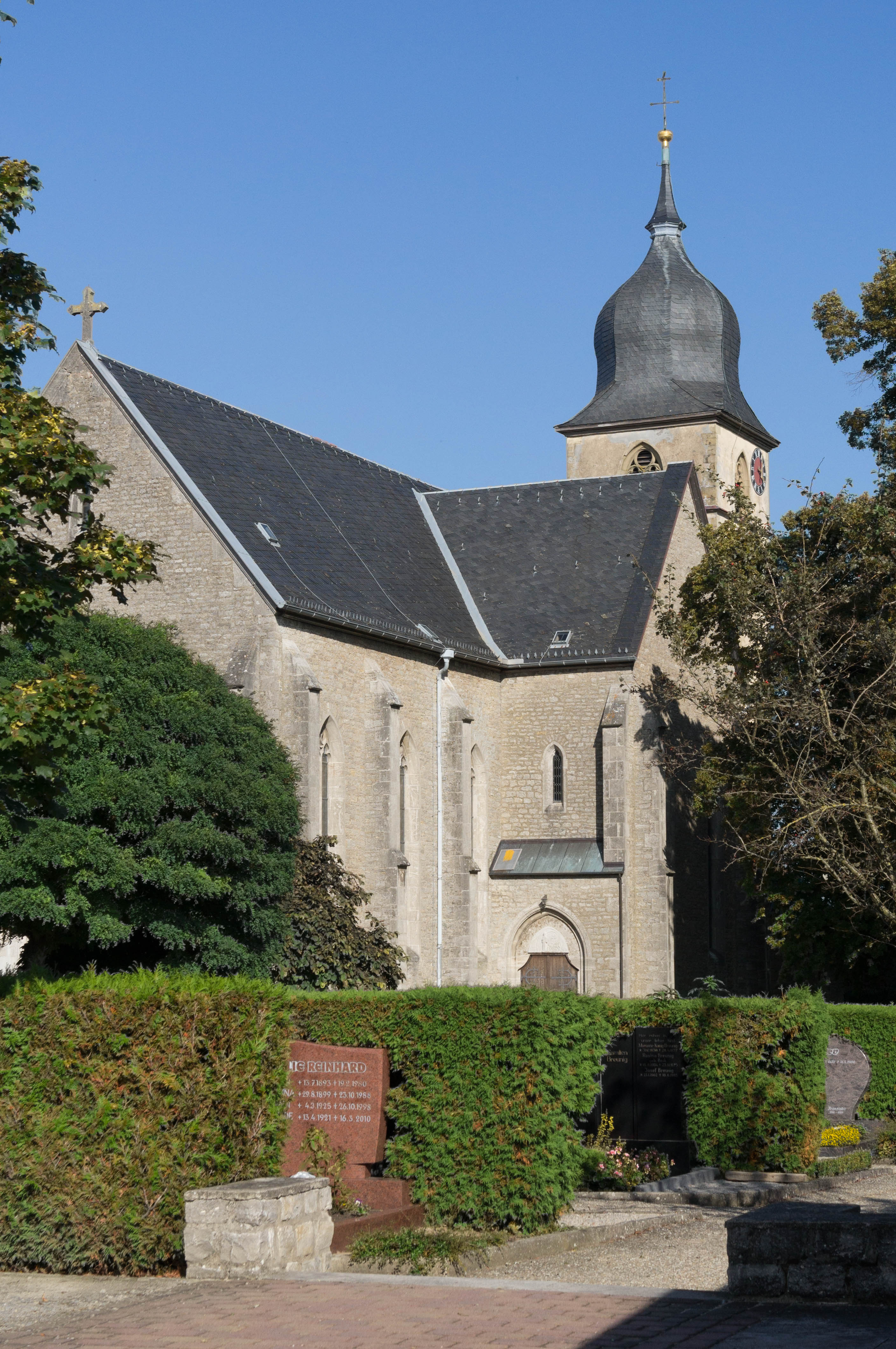 katholische Pfarrkirche St. Peter und Paul in Eßfeld, einem Ortsteil von Giebelstadt